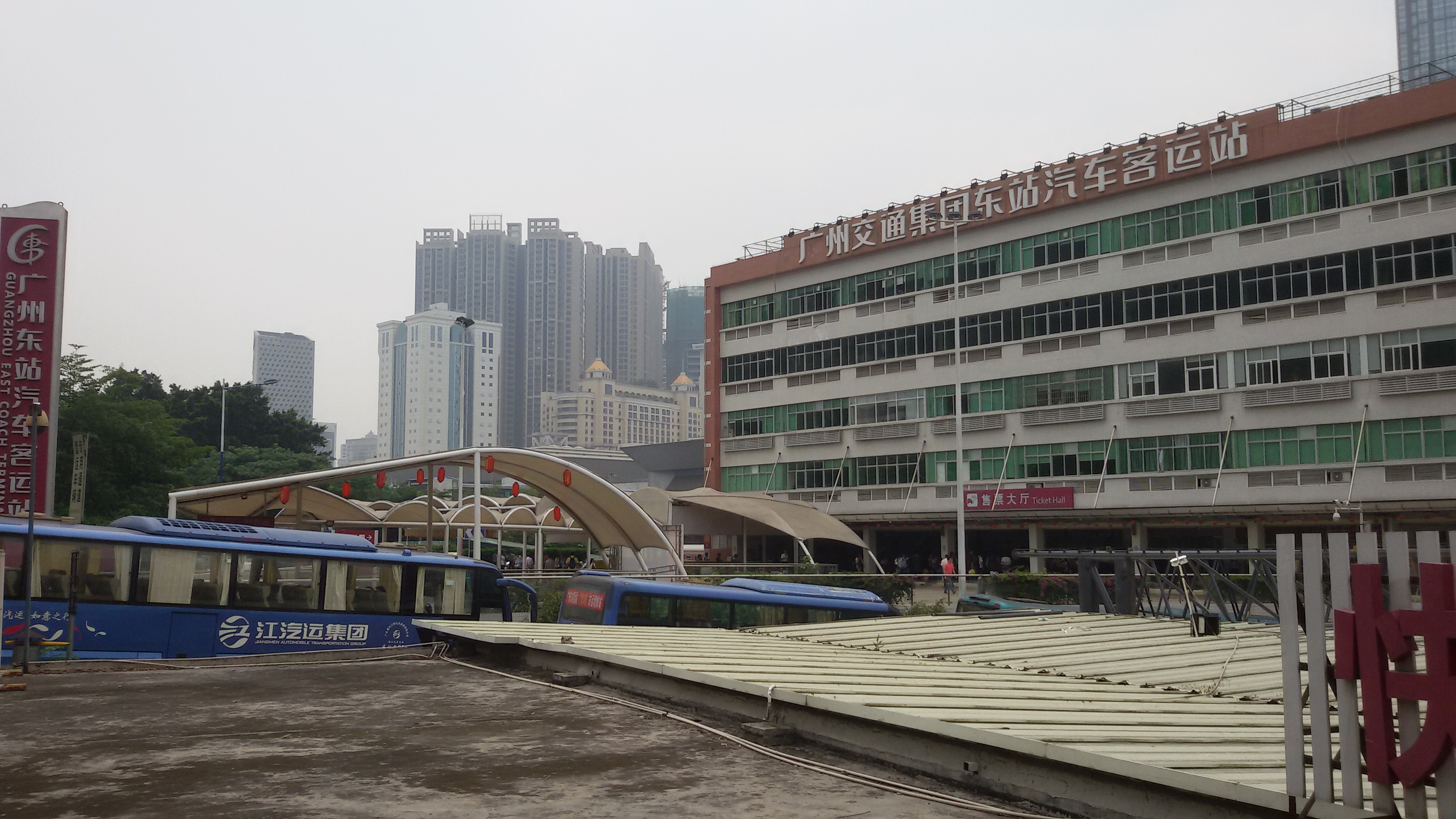 粵語: 廣州交通集團東站汽車客運站